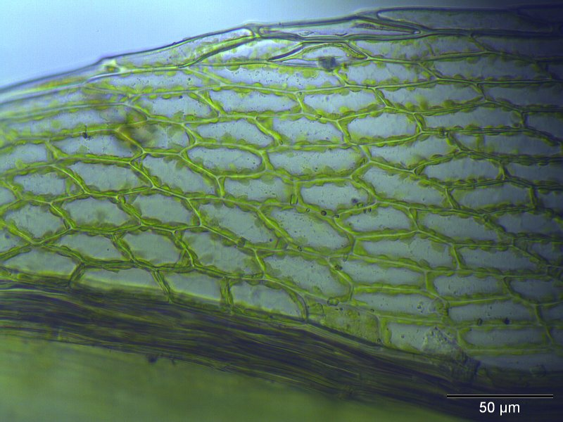 Zierliches Birnmoos (Bryum elegans), Laminazellen, Vergrößerung: 400x